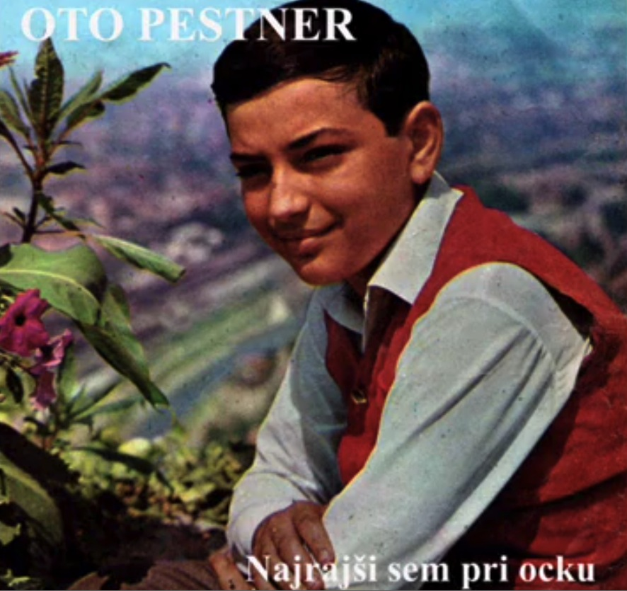 Album Najrajši sem pri očku pevca Ota Pestnerja.